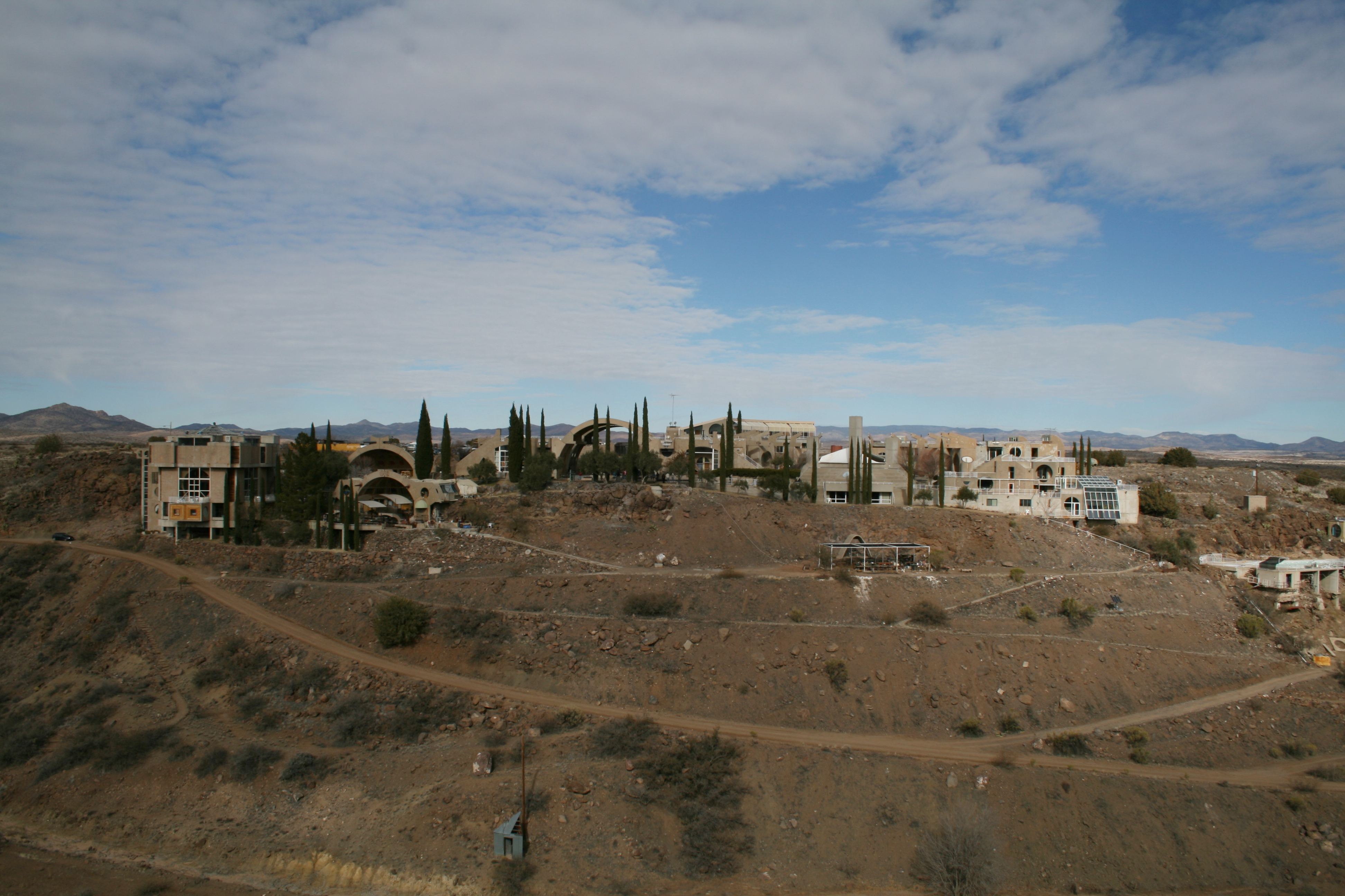 Arcosanti